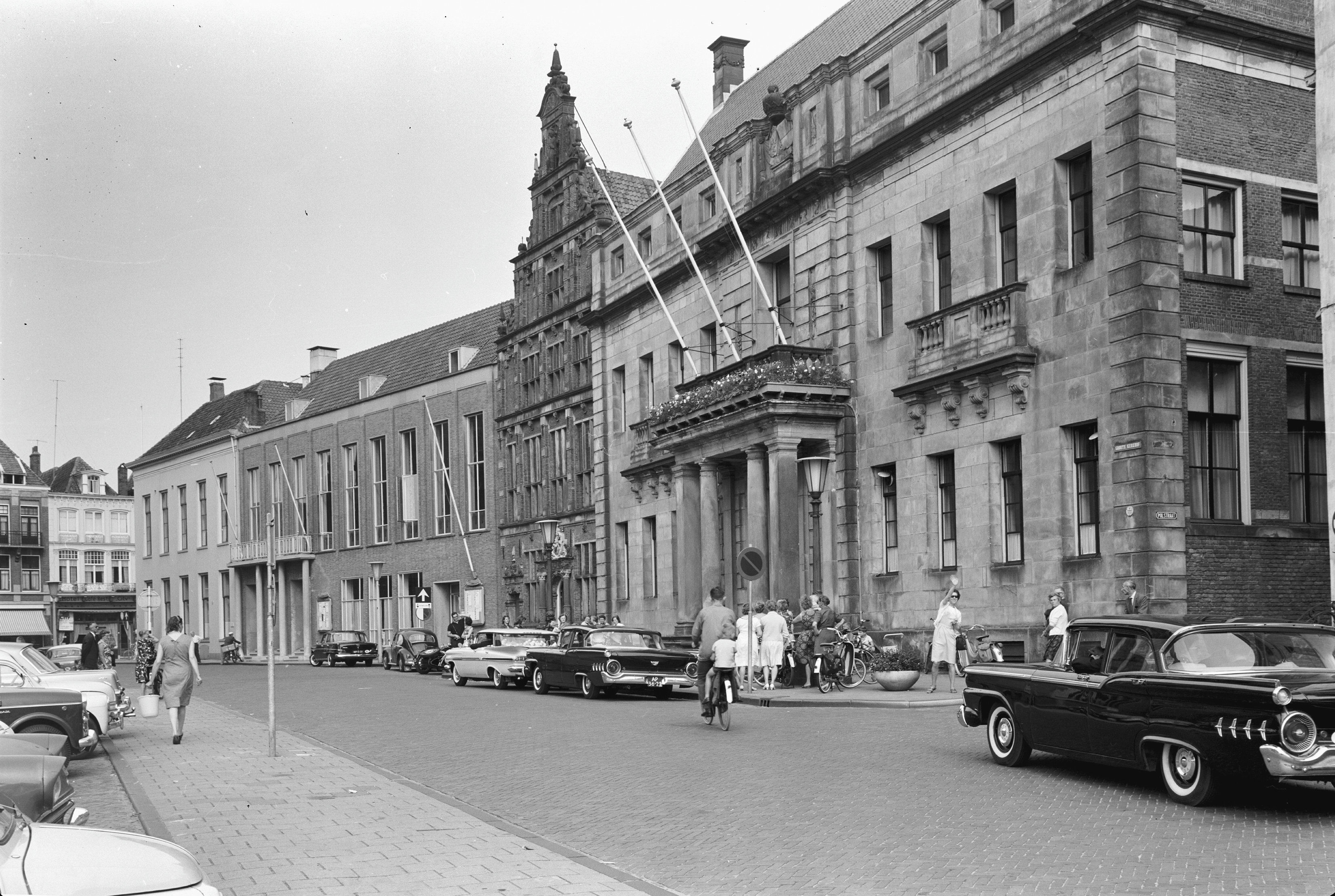 overzicht met Stadhuis